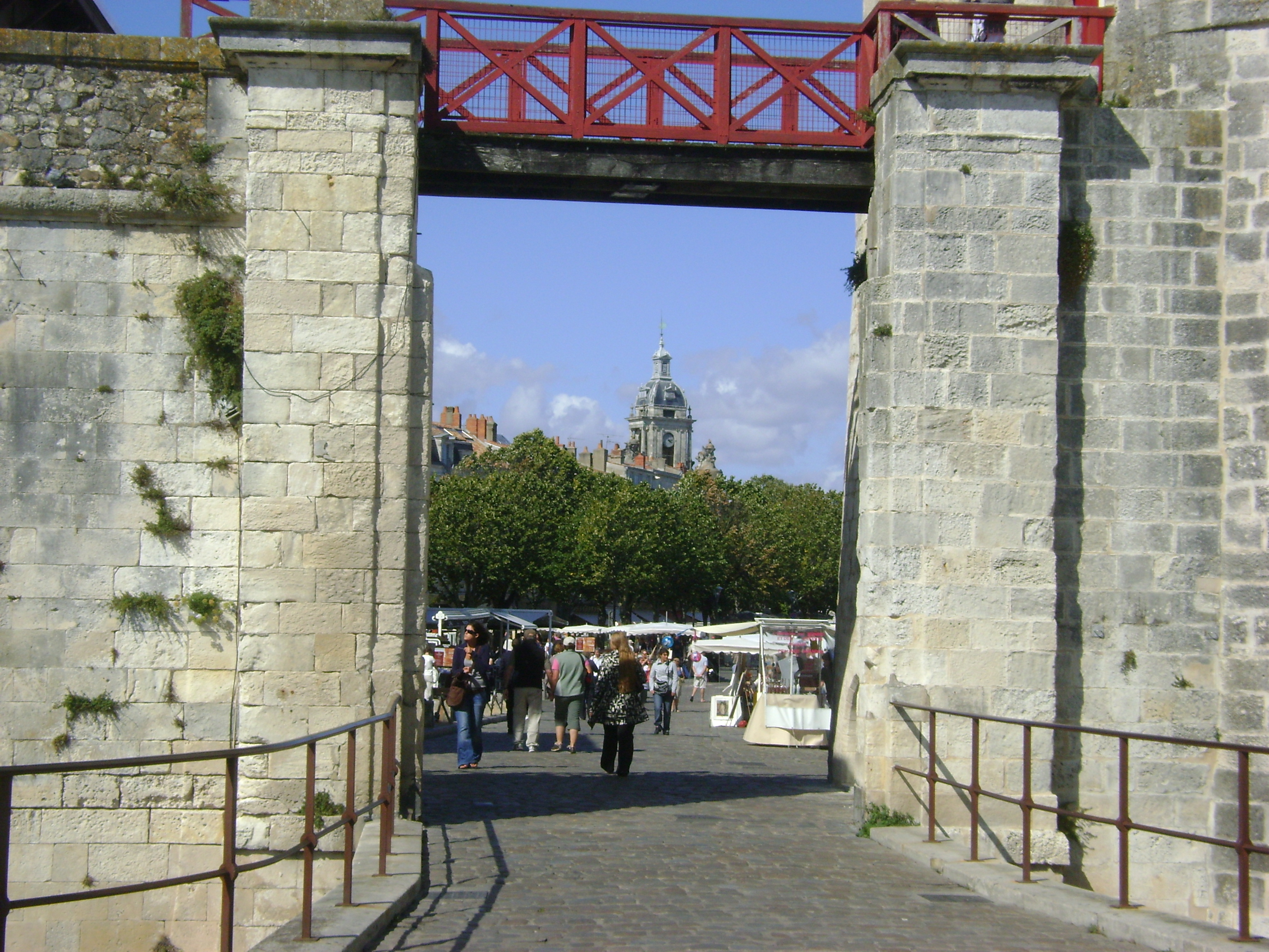 Anciennes fortifications maritimes de la Rochelle. XVIIème siècle. La Porte des Dames à l'extrémité de l'ancien rempart.